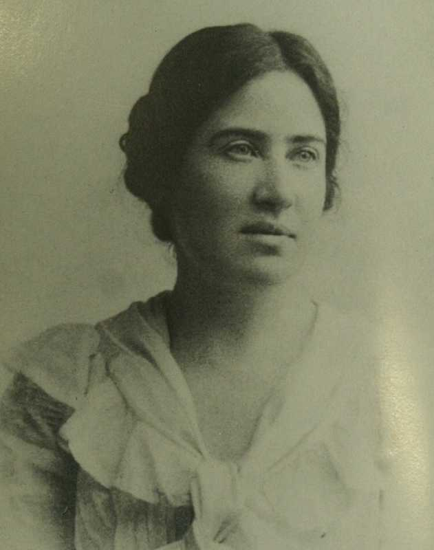 hochgeladen nach Commons, da das Foto von 1892 ist und der unbekannte Fotograf vor 1947 gestorben ist. 1892 minus Lebensalter des Fotografen 30 plus 70 plus 1 PD-Old-70